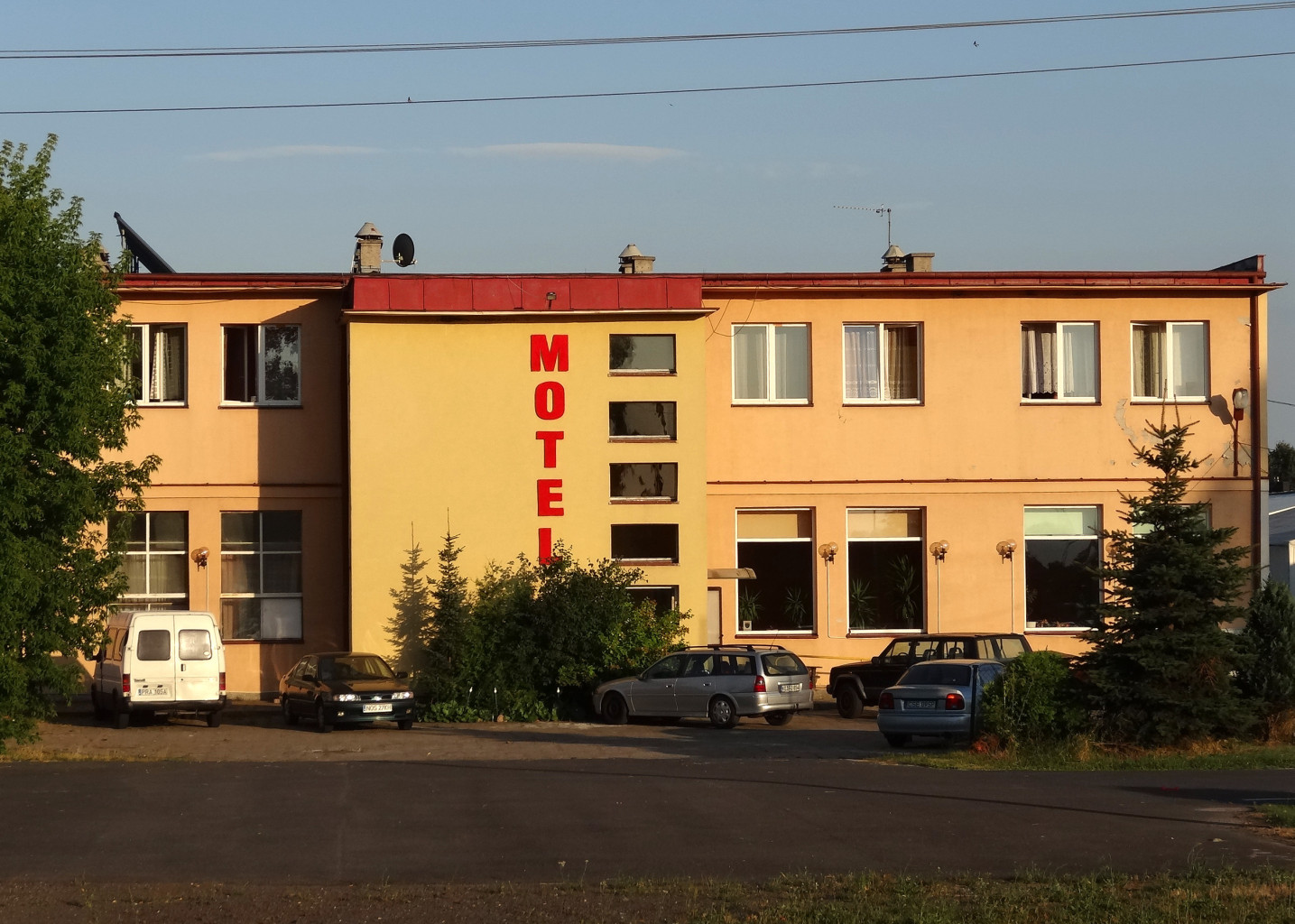 Motel na Niwach, przy drodze krajowej nr 5 Bydgoszcz-Gdańsk w Niwach, gmina Osielsko, powiat bydgoski